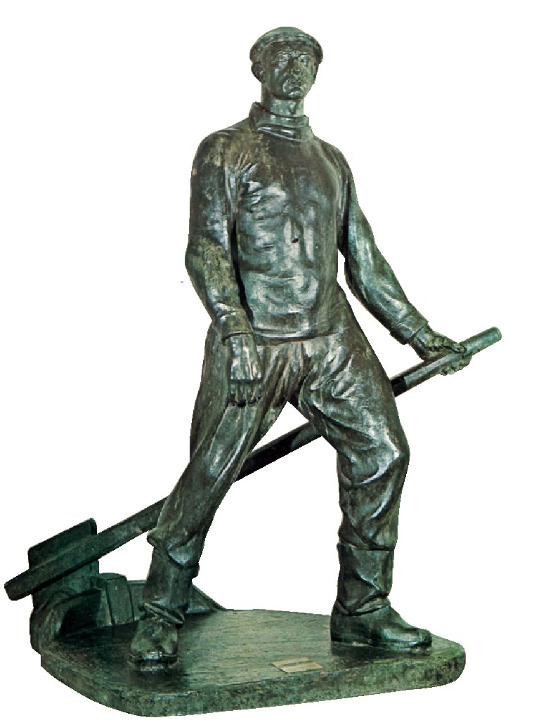 “El timonel”, Quintín de Torrerena. Eredu errealak oinarri harturik, hiperbole espresionista baten bidez, keinuak nabarmentzen ditu artista honek, eta bere irudiak ereduzko bihurtzen ditu horrela.